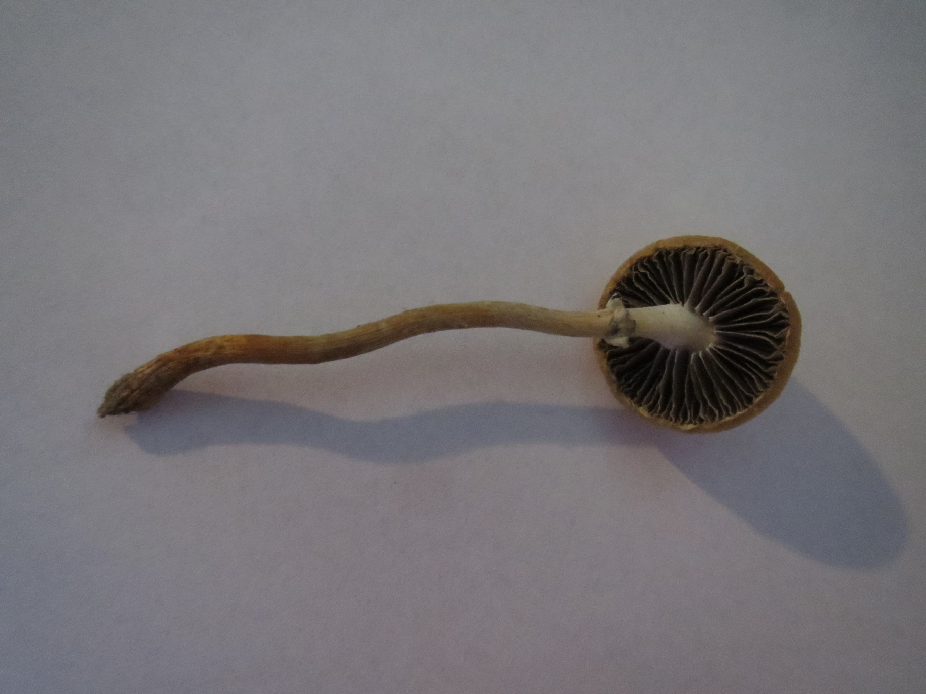 Rantakaulussieni kuuluu kevätsieniin